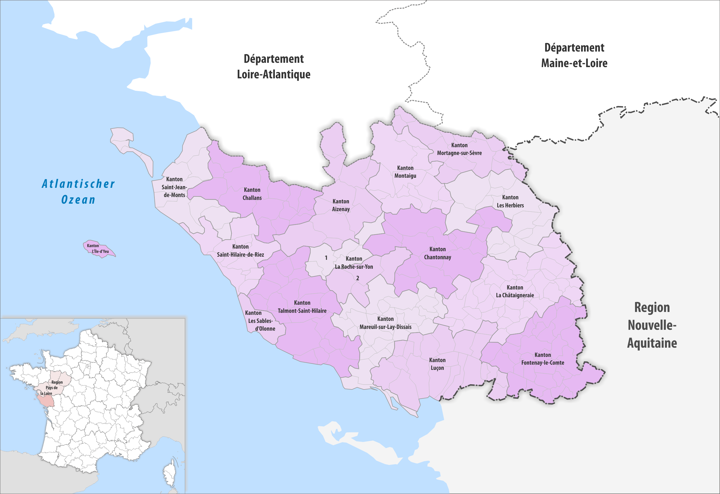 Gemeinden und Kantone im Departement Vendée